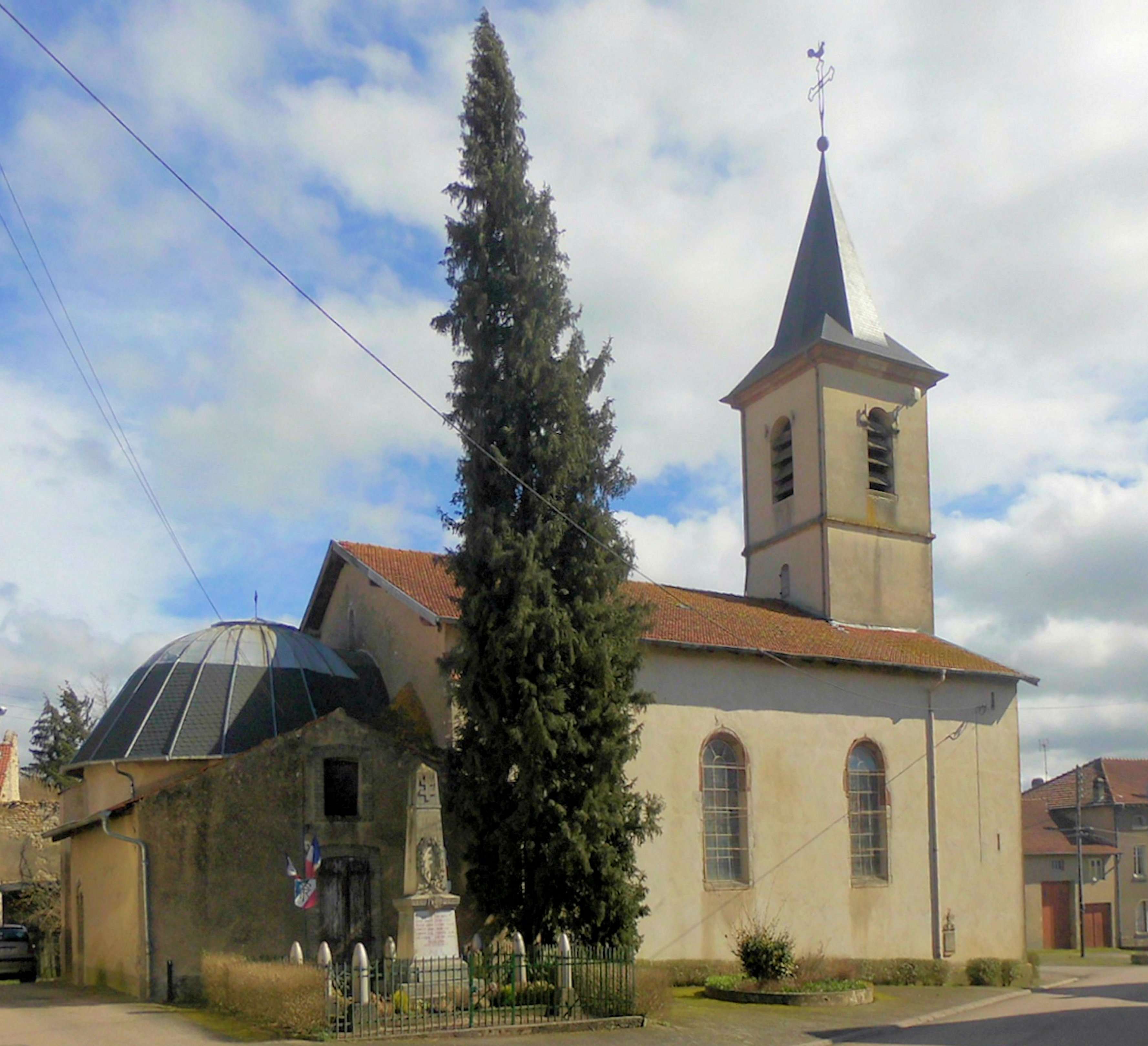 L'église Saint-Jacques-le-Majeur et monument aux morts d'Einvaux